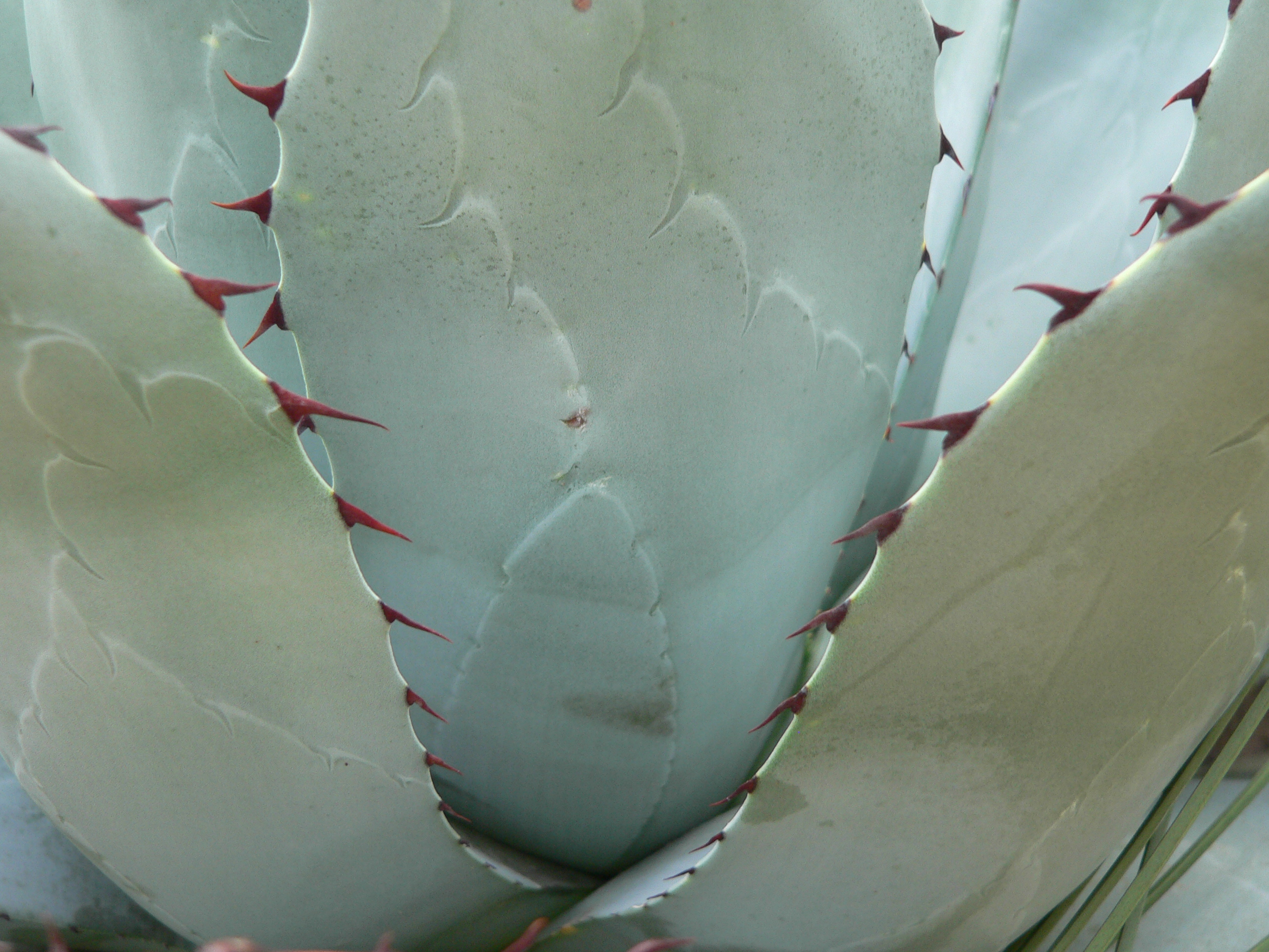 Agave paarasani